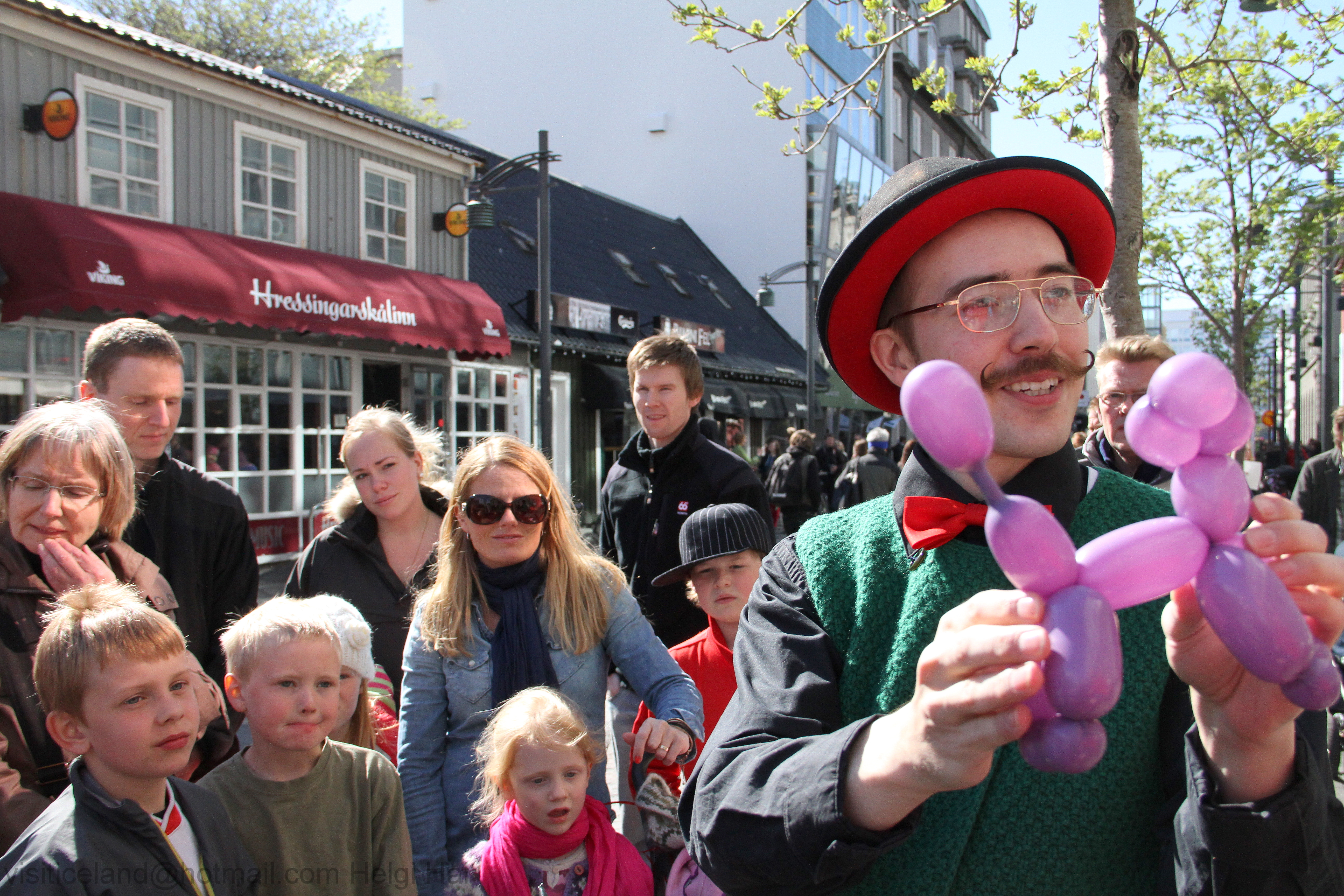 From Reykjavík, Iceland.